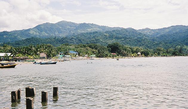 Omoa Bay